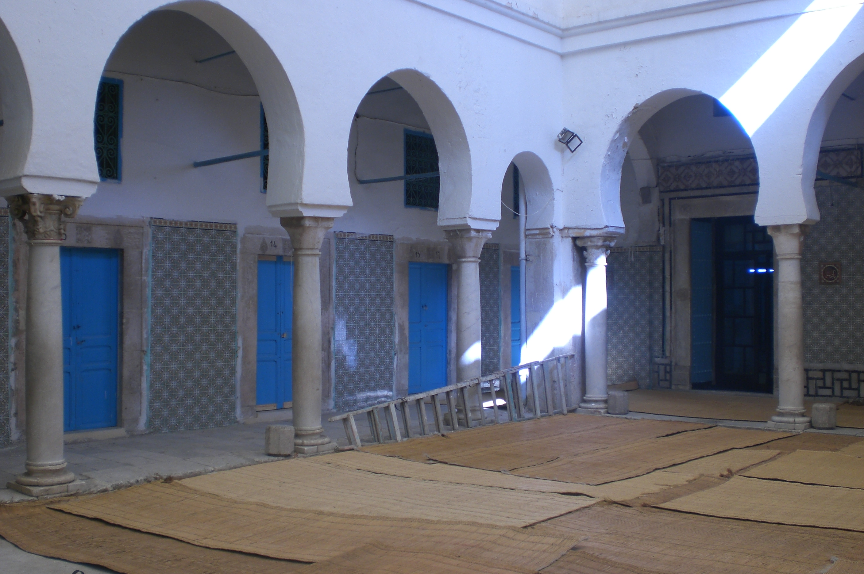 Medersa Jamaa Jdid-Tunis